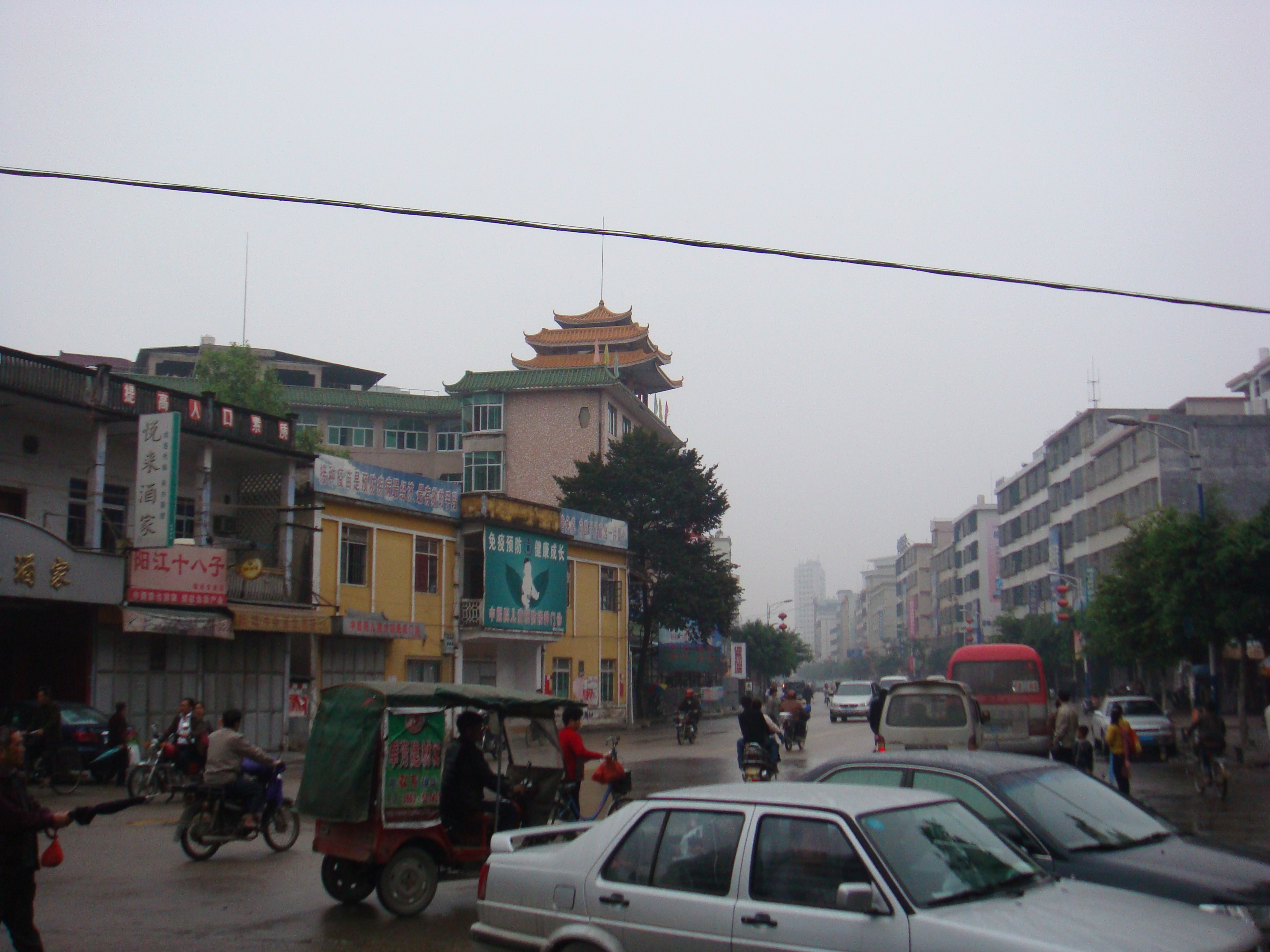 揭西河婆